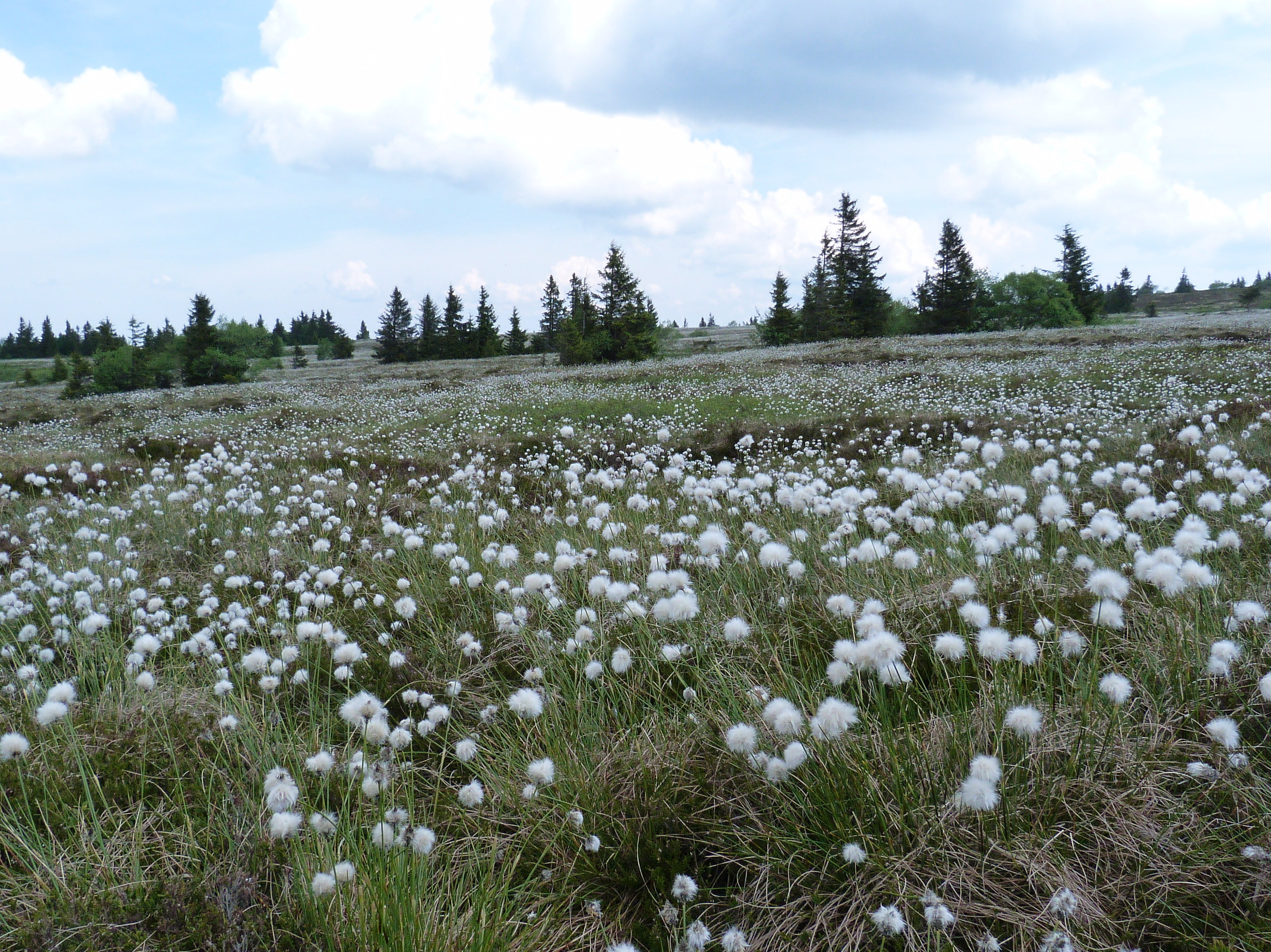 Linaigrette engainée (Eriophorum vaginatum) au gazon du Faing (massif des Vosges).